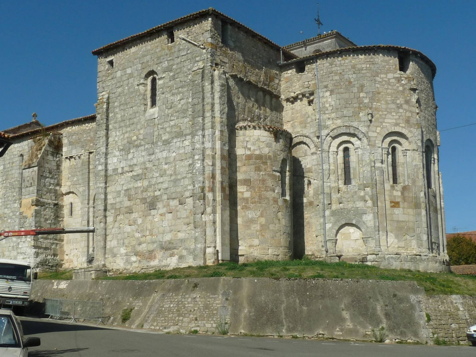 église de Brossac (16), France